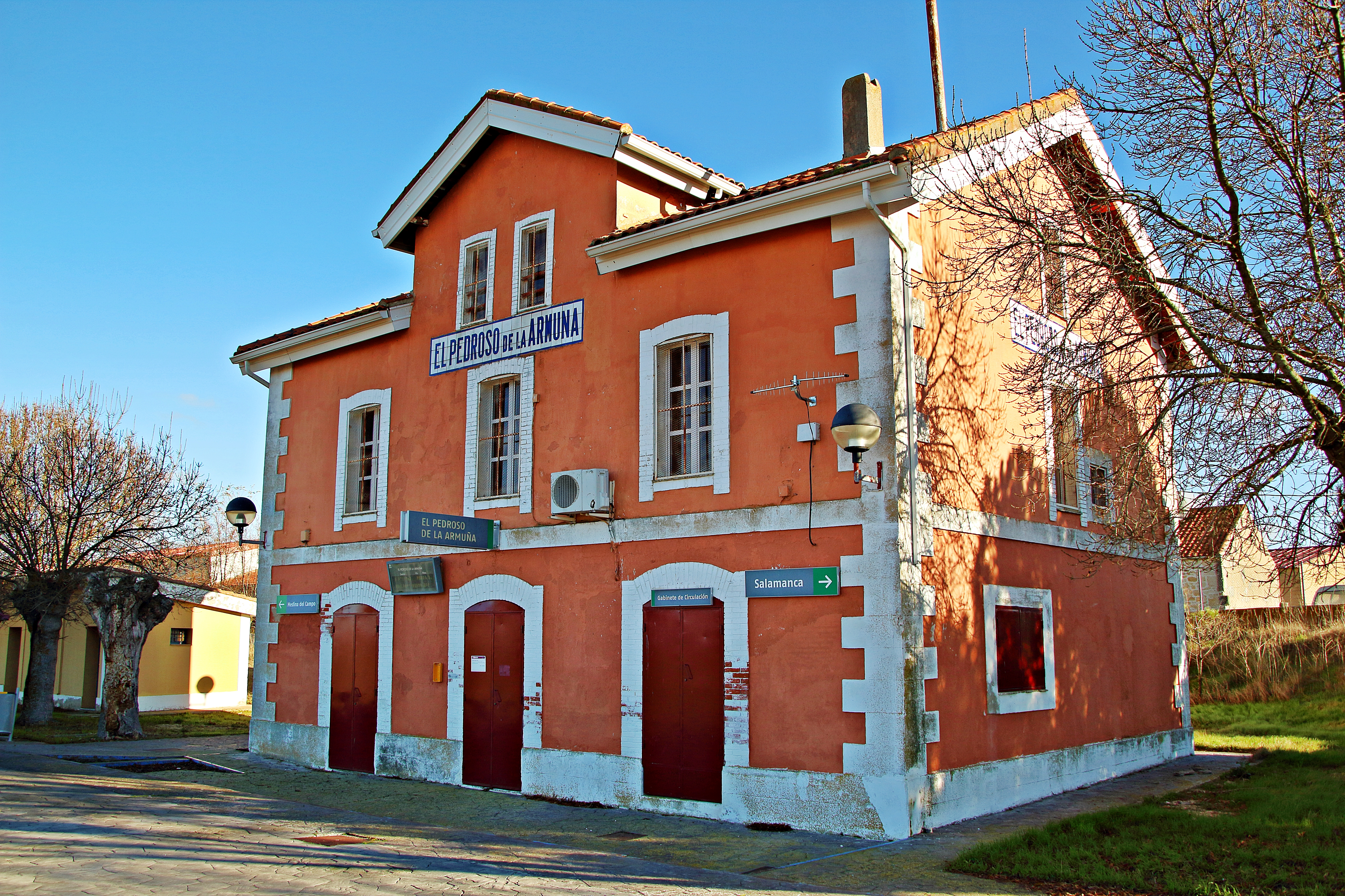 El Pedroso de la Armuña municipio de la comarca de La Armuña, provincia de Salamanca.